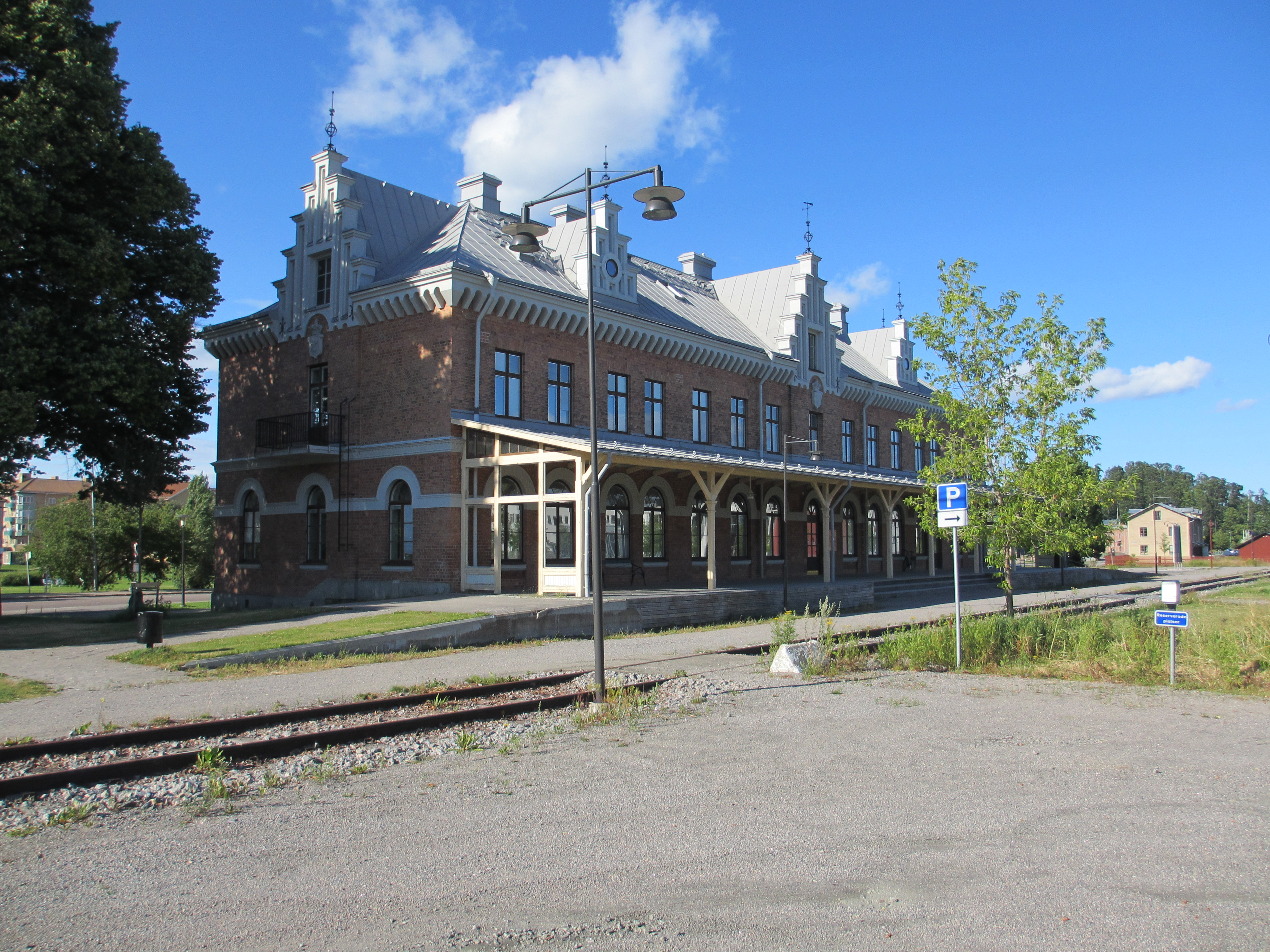 Söderhamns numera nedlagda centralstation (2013)